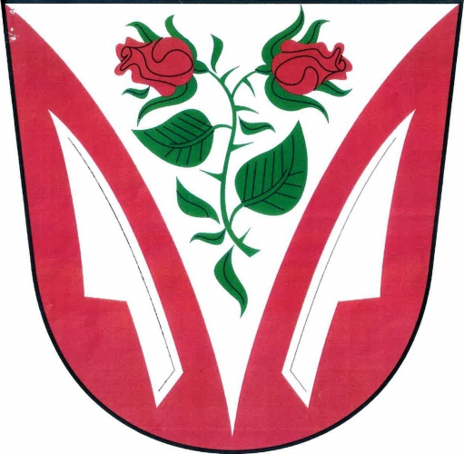 znak, Třebětice, okres Kroměříž